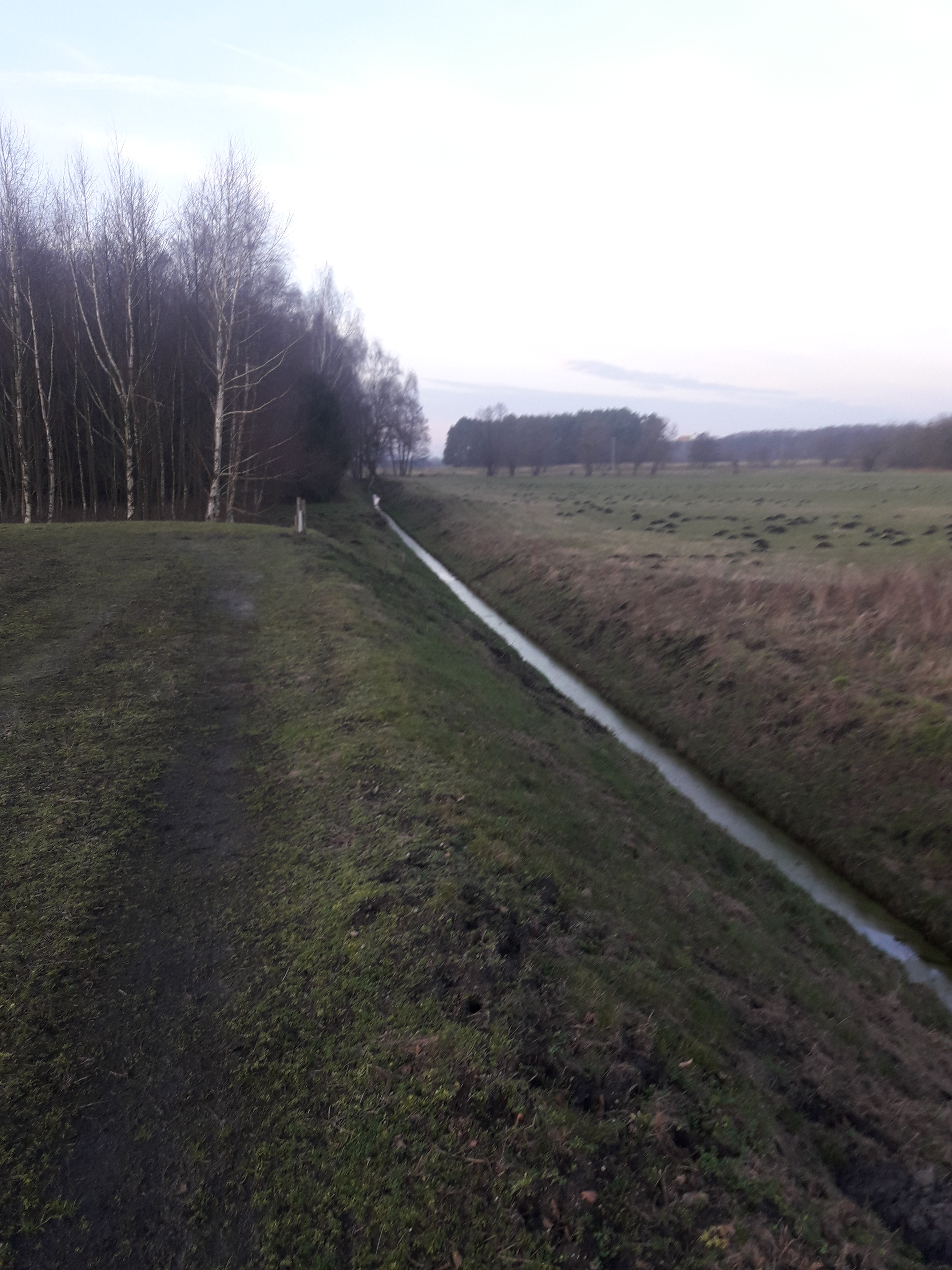 Przeplyw Rowu Hermana niedaleko źródła